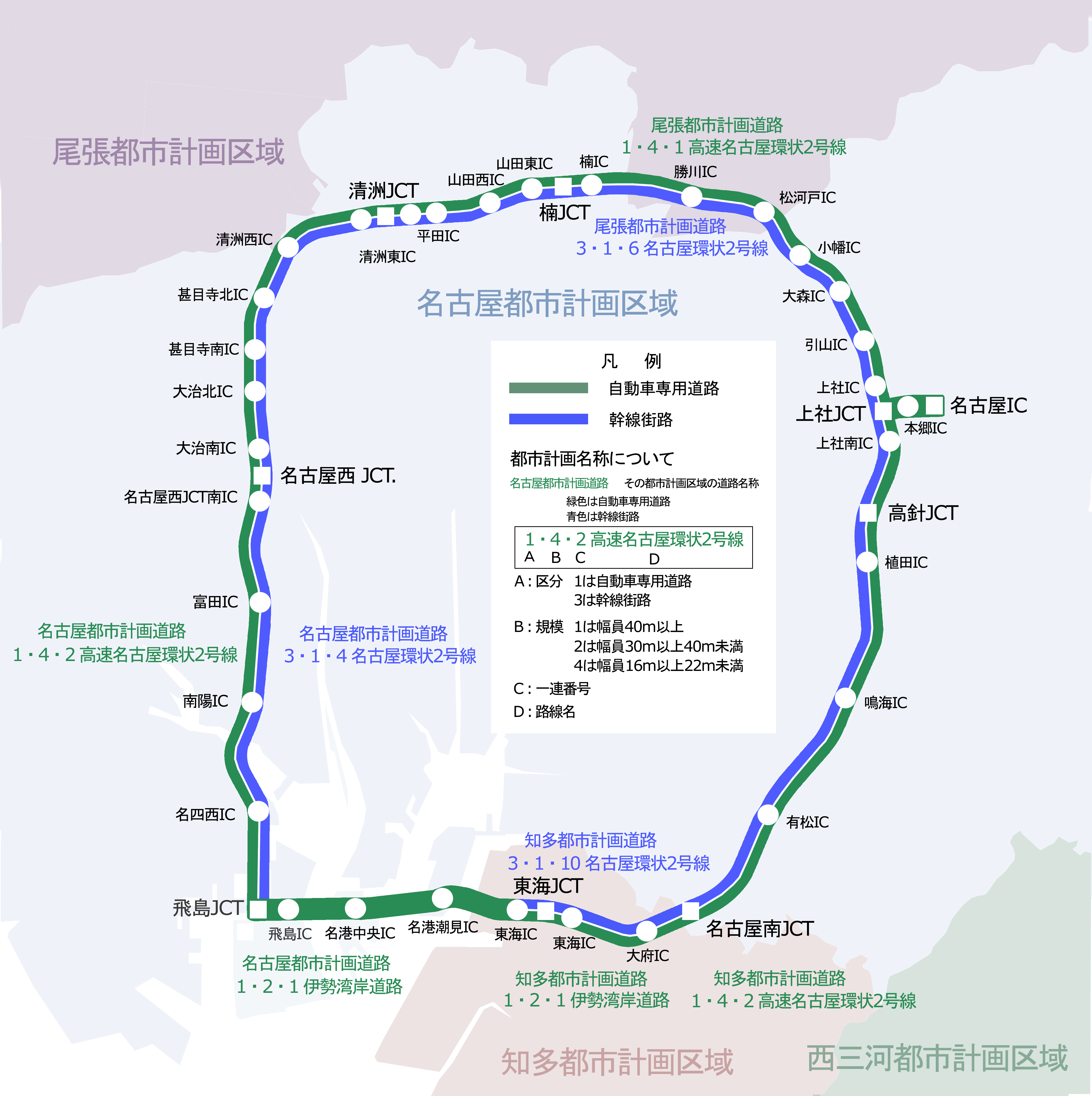 名古屋環状2号線都市計画図。都市計画区域は2010（平成22）年12月24日の再編後を適用している。都市計画区域名称、路線名、路線番号は名古屋市都市計画図、大府市および東海市都市計画図を基に記載（計画図は名古屋都市センターまちづくりライブラリーで閲覧可能）。『愛知県公報』第2741号別冊2号、平成22年12月24日、7 - 18頁も参考図書である。